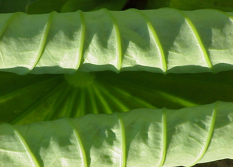 Palmengarten, Frankfurt am Main, Deutschland, Germany